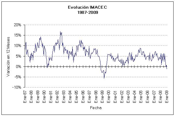 Variación interanual IMACEC sobre datos disponibles en sitio web Banco Central de Chile.